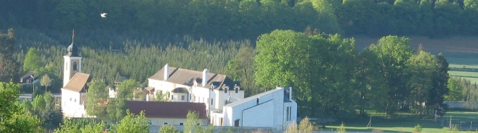 Gesamtansicht des Hellerhofes in Paudorf von Norden Sonstiges: ...